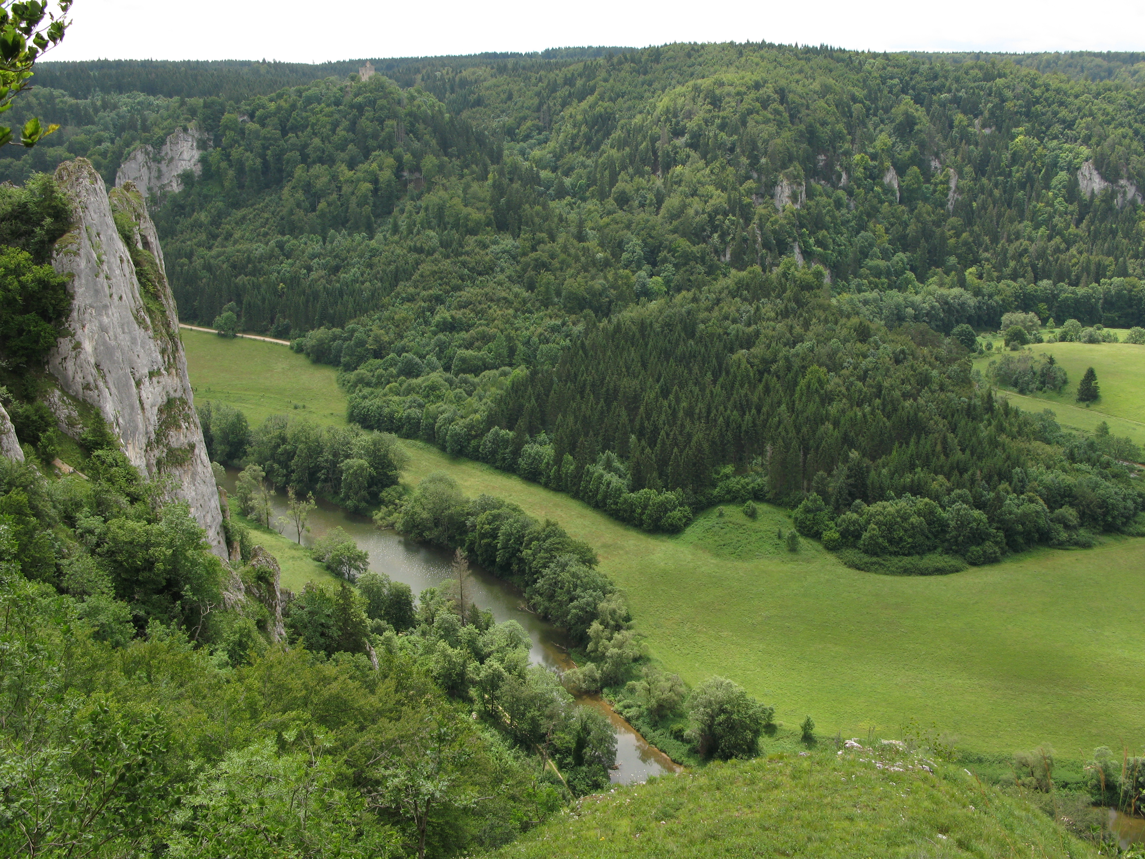 Die Donau und hinten oberhalb die Burgruine Kallenberg gesehen von dem Stiegelesfelsen am Donauberglandweg auf der Schwäbischen Alb.